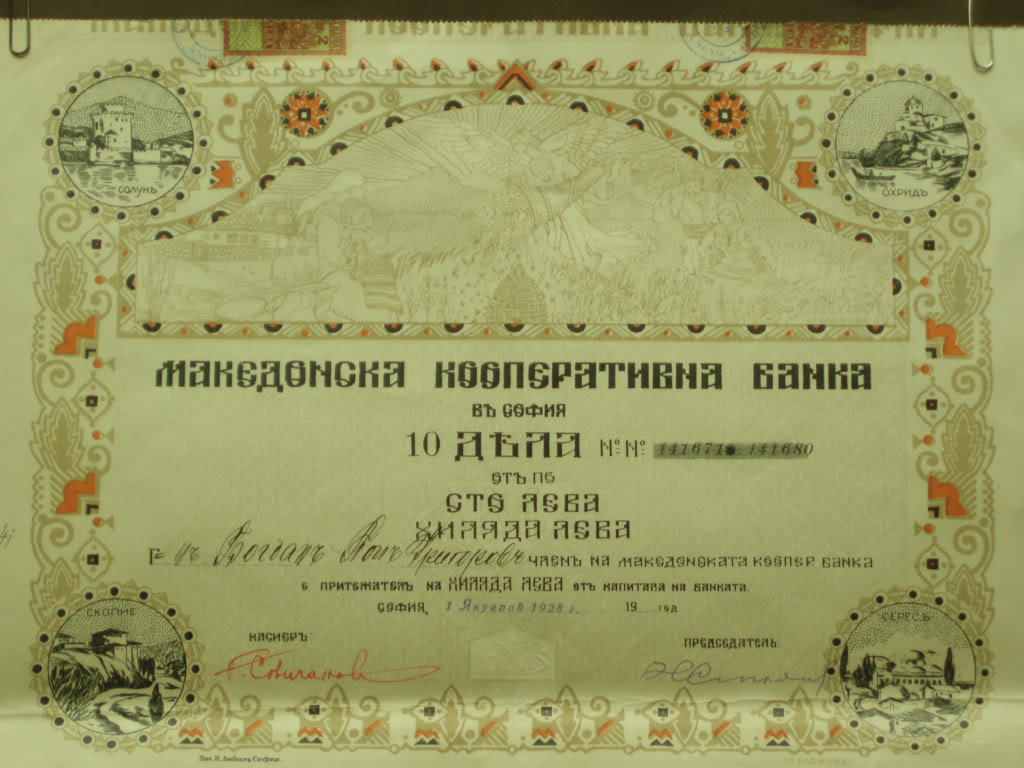 Акция на Македонската кооперативна банка.